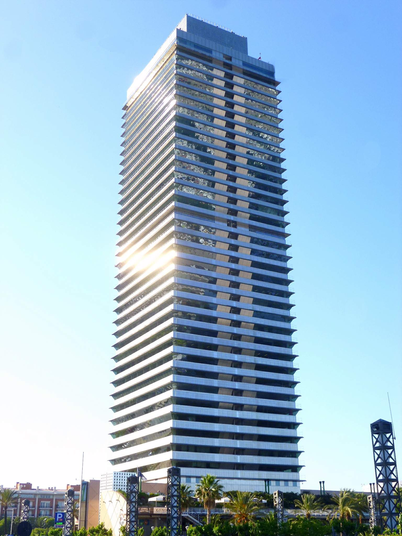 Barcelona - Torre Mapfre